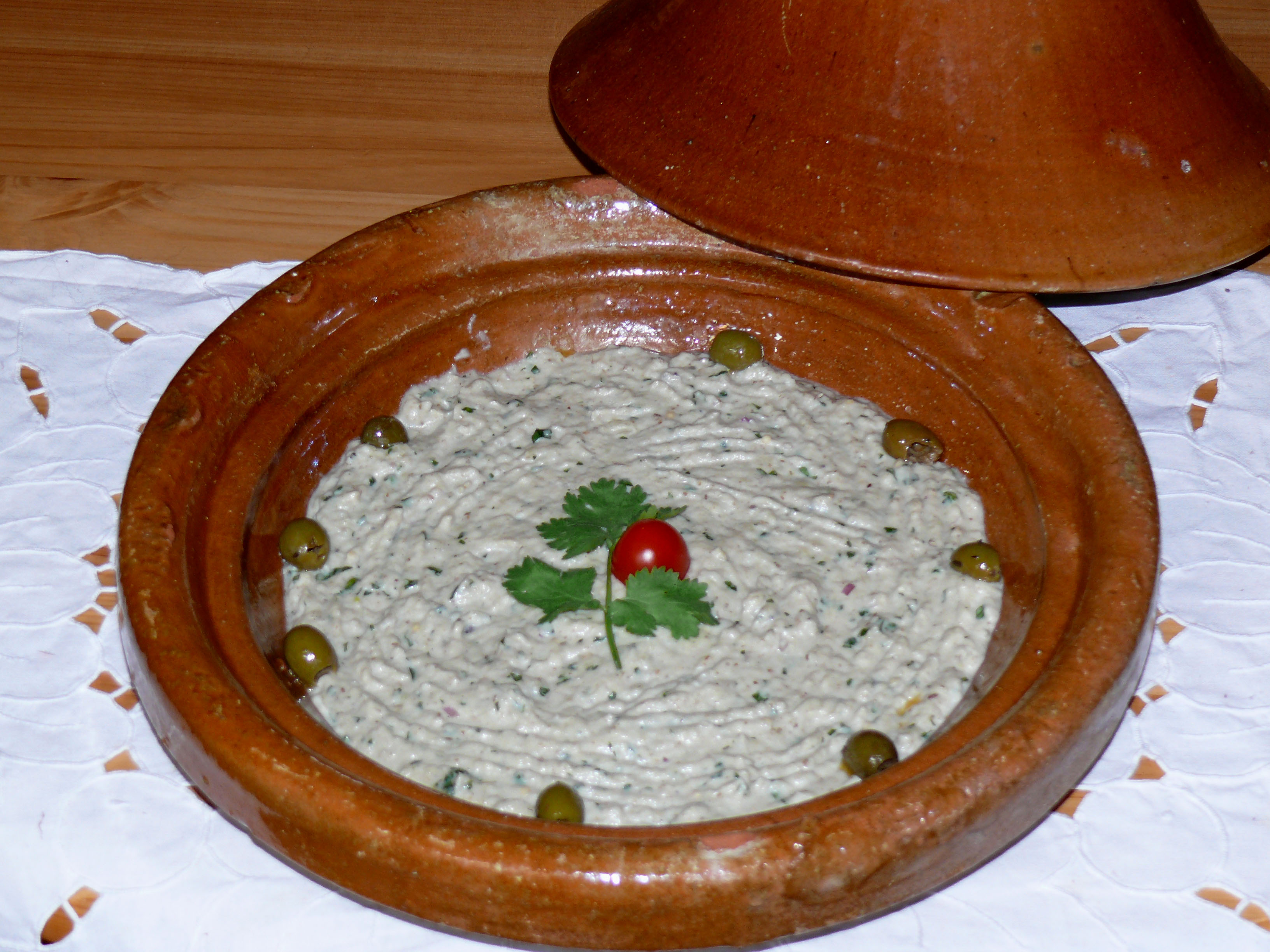 Arabisches Gericht